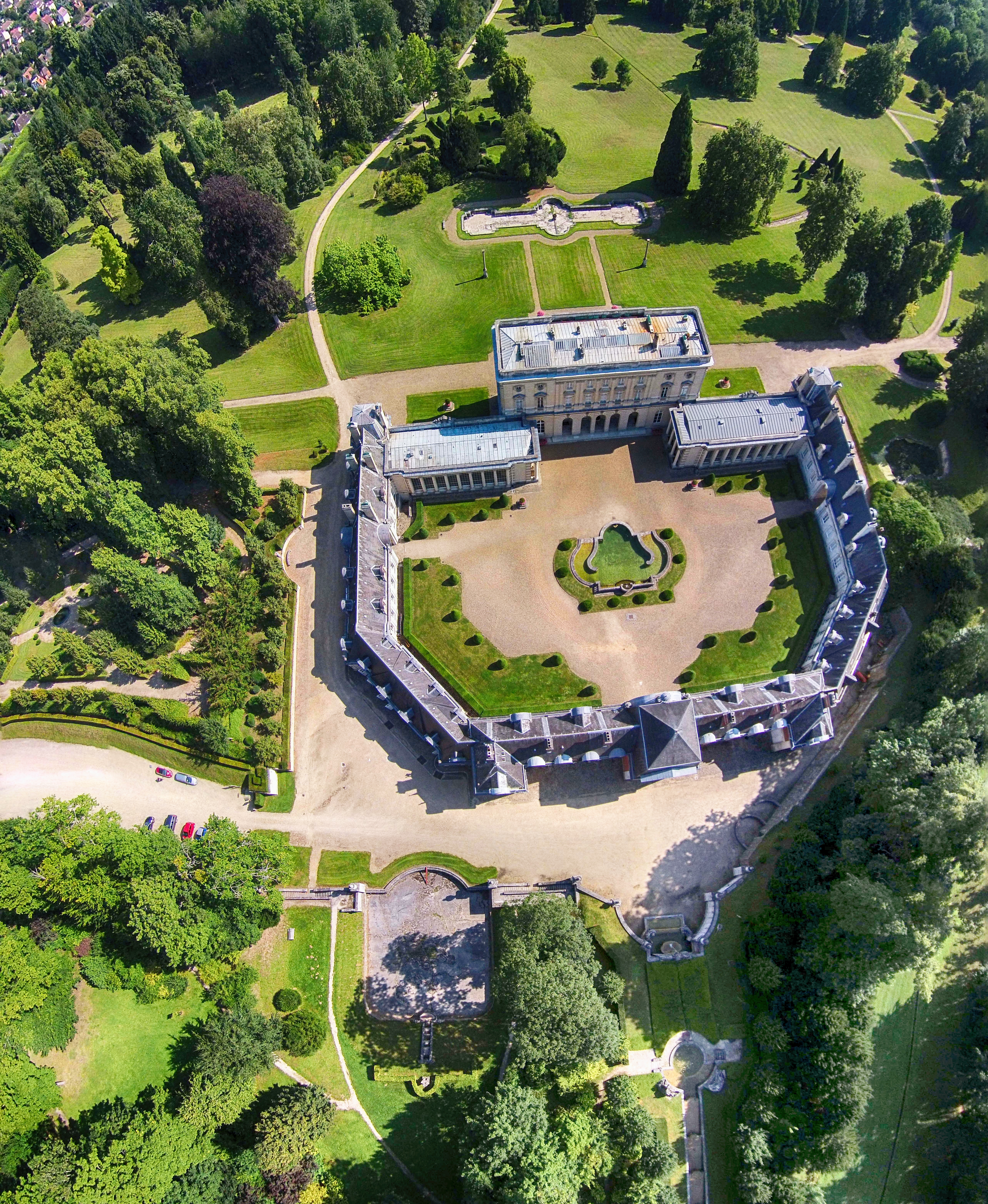 Château de Bizy, Vernon, Eure, Normandie,France